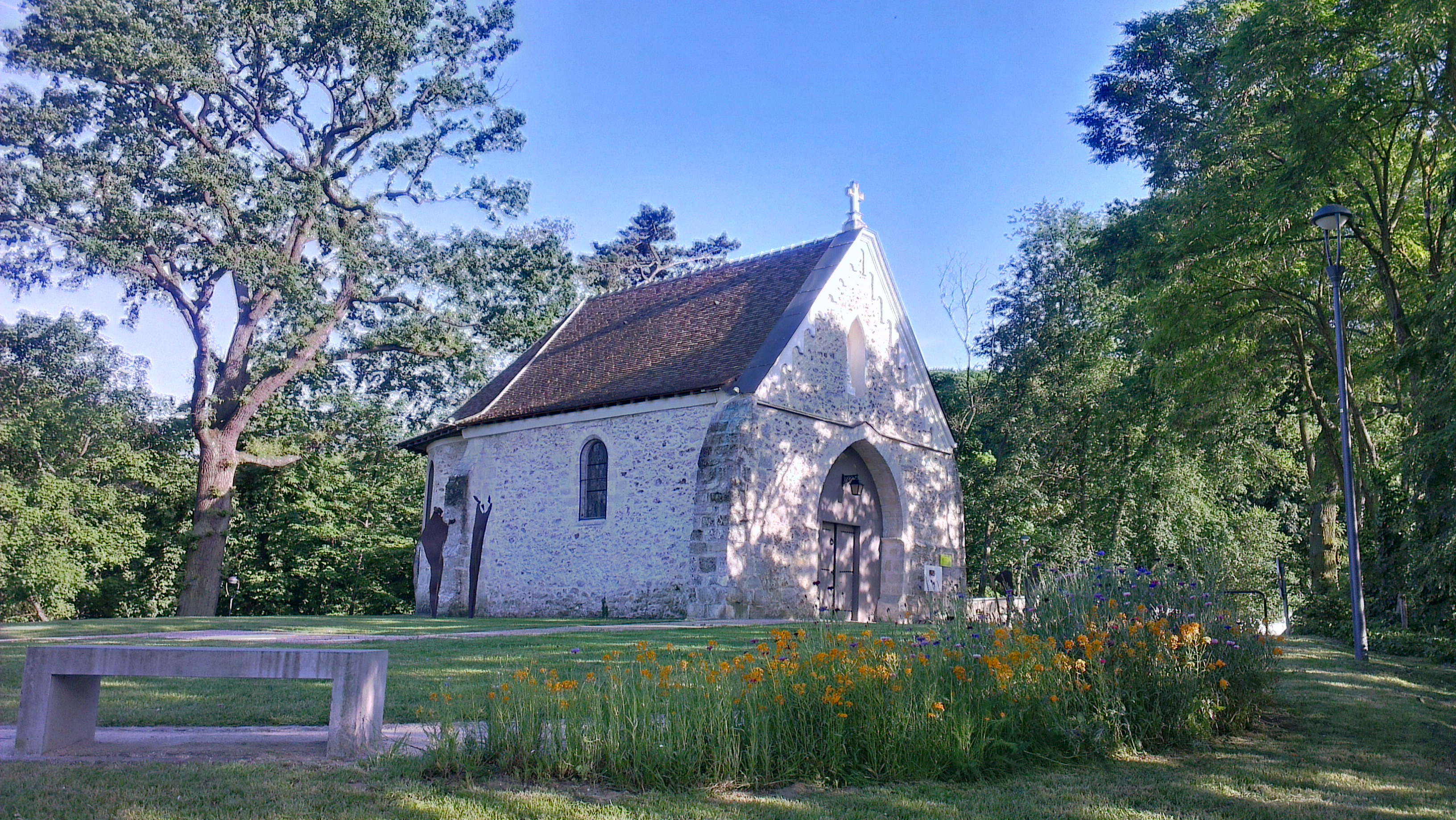 Fontenay le Fleury - Chapelle St Jean